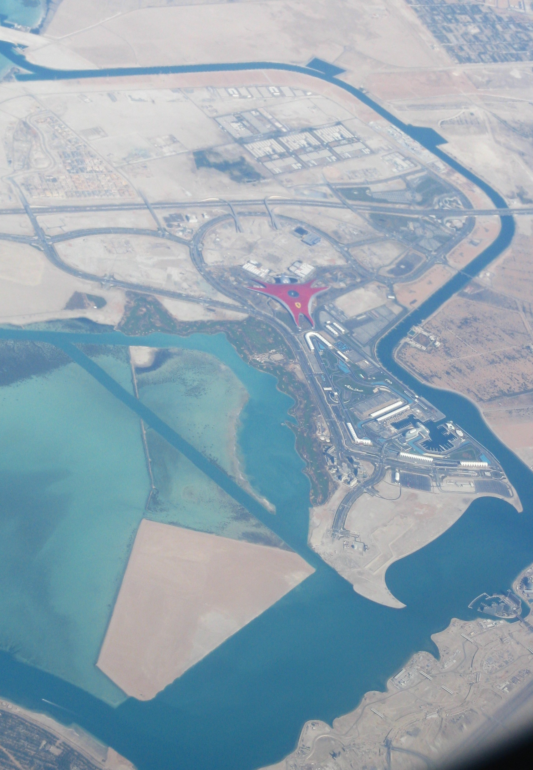 Formel 1-Rennstrecke, Dragster-Rennstrecke, Abu Dhabi, Rennstrecke Vereinigte Arabische Emirate, Ferrari World, Bauwerk in Abu Dhabi